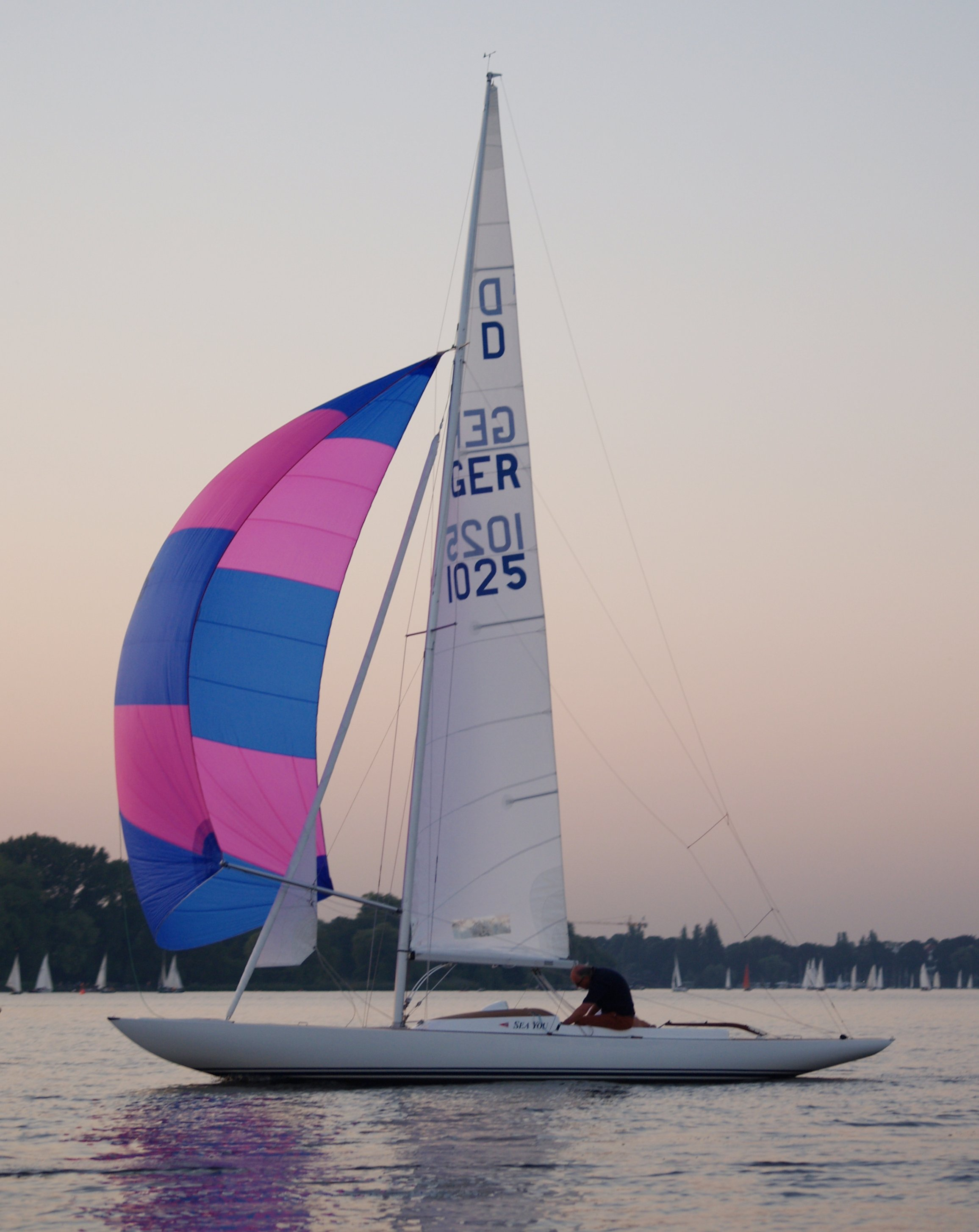 Drachen